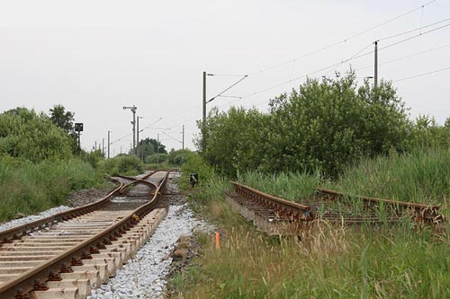 Abzweig Abelitz, im Hintergrund die Hauptstrecke Emden - Norddeich